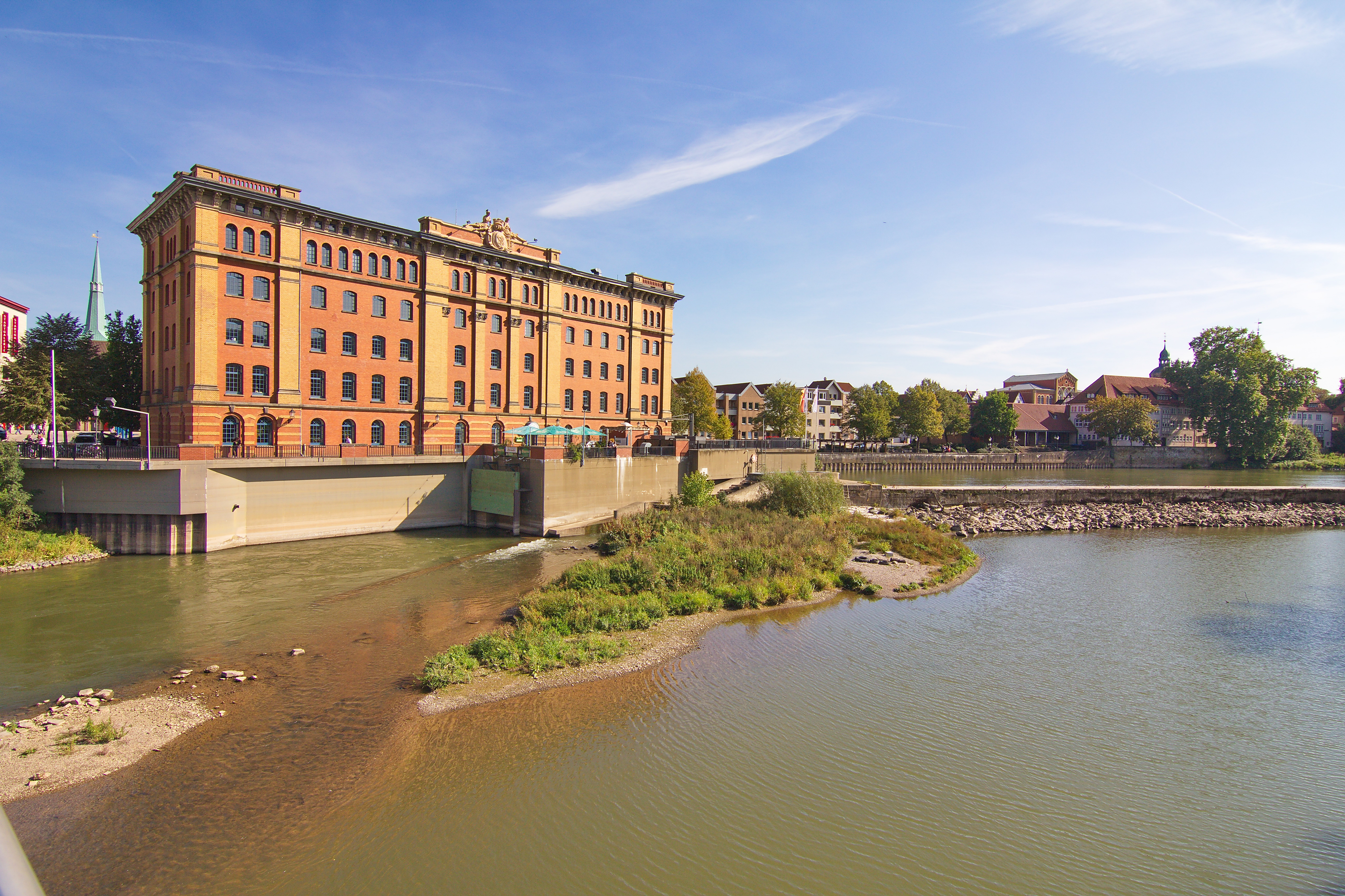 Pfortmühle an der Weser in Hameln, Niedersachsen, Deutschland